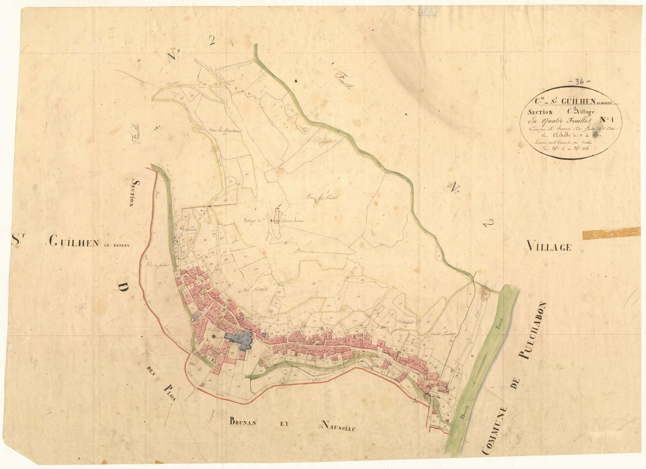 Saint-Guilhem-le-Désert. - Cadastre napoléonien : plan de la section C1 du Village (1828)